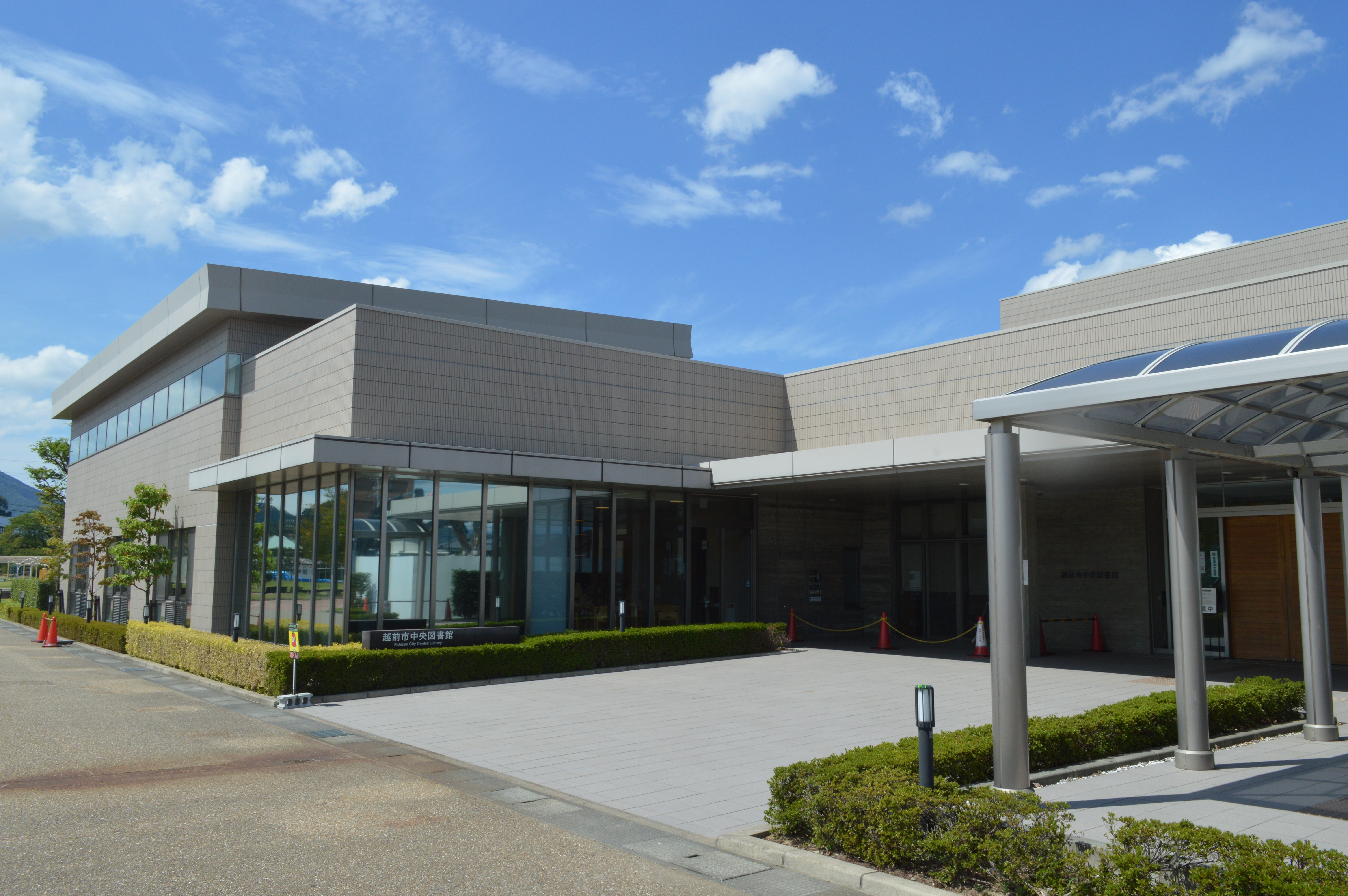 越前市立図書館のひとつ、越前市中央図書館。